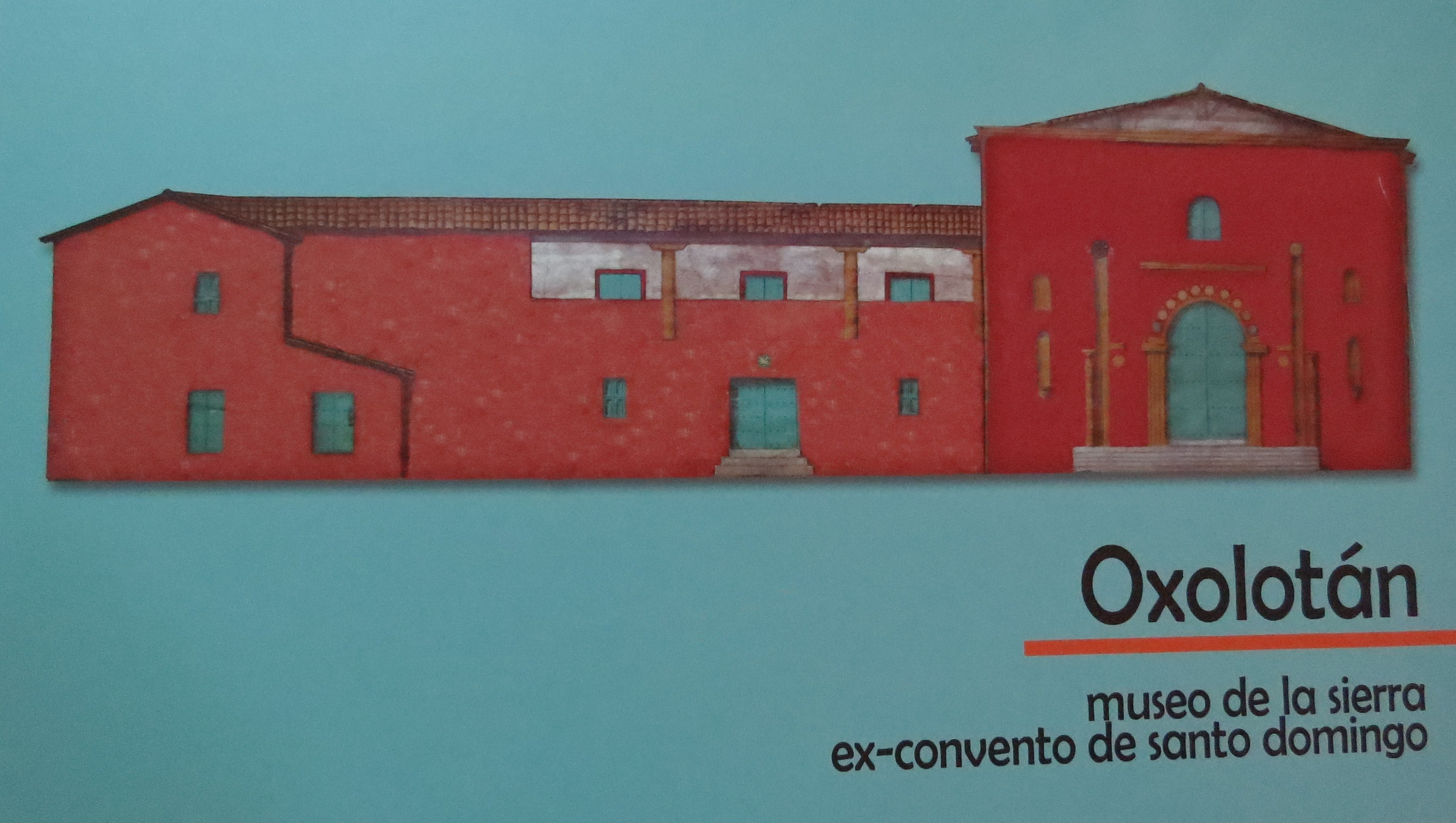 Recreación digital de la fachada original del ex-convento de Santo Domingo de Guzmán. Construido entre 1572 y 1633, y dinamitado en 1926 durante la campaña antirreligiosa, por los seguidores del ex gobernador Tomás Garrido Canabal. Oxolotán, municipio de Tacotalpa, Tabasco, México.